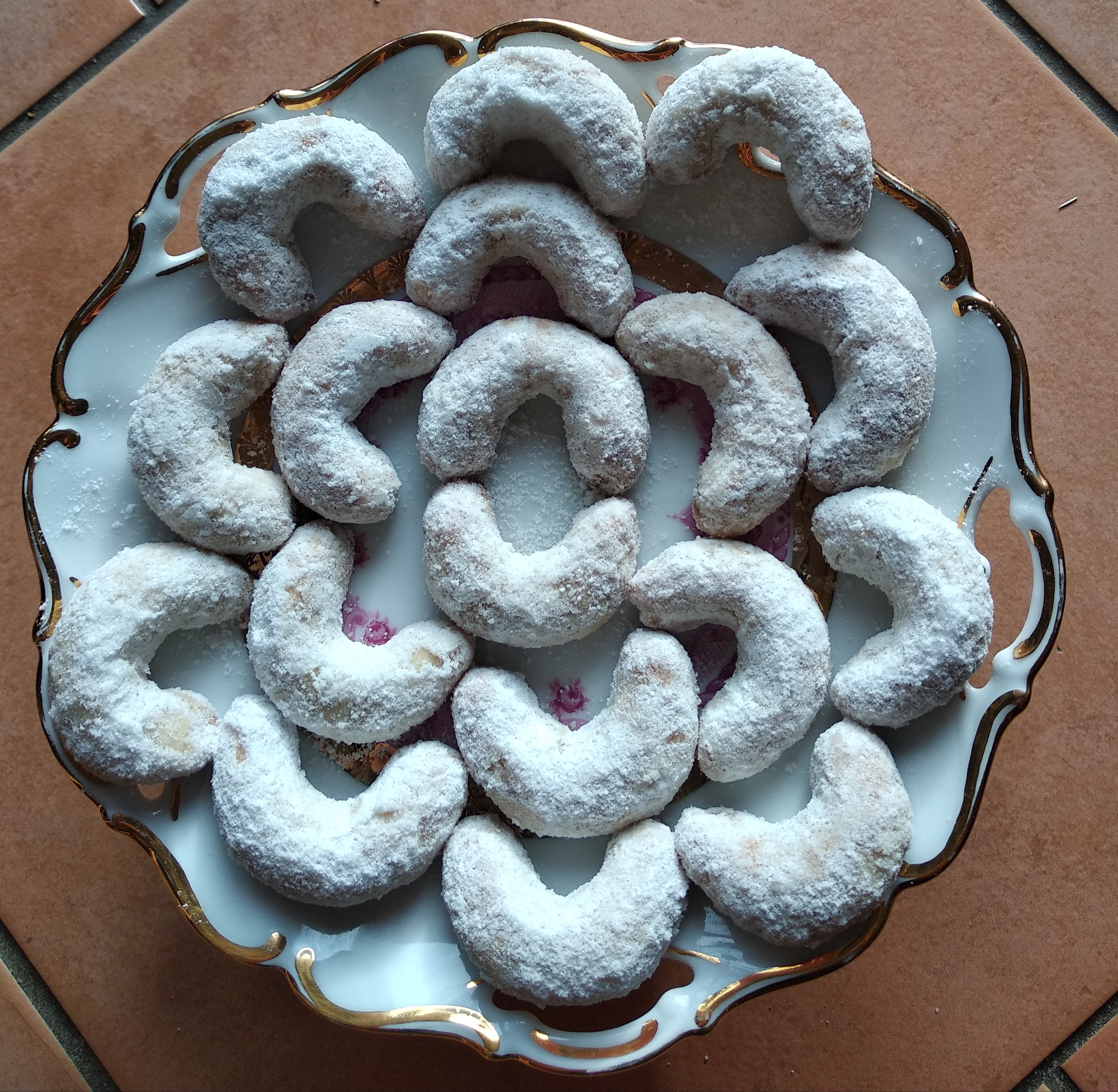 Vanilkové rohlíčky: tradiční vánoční cukroví